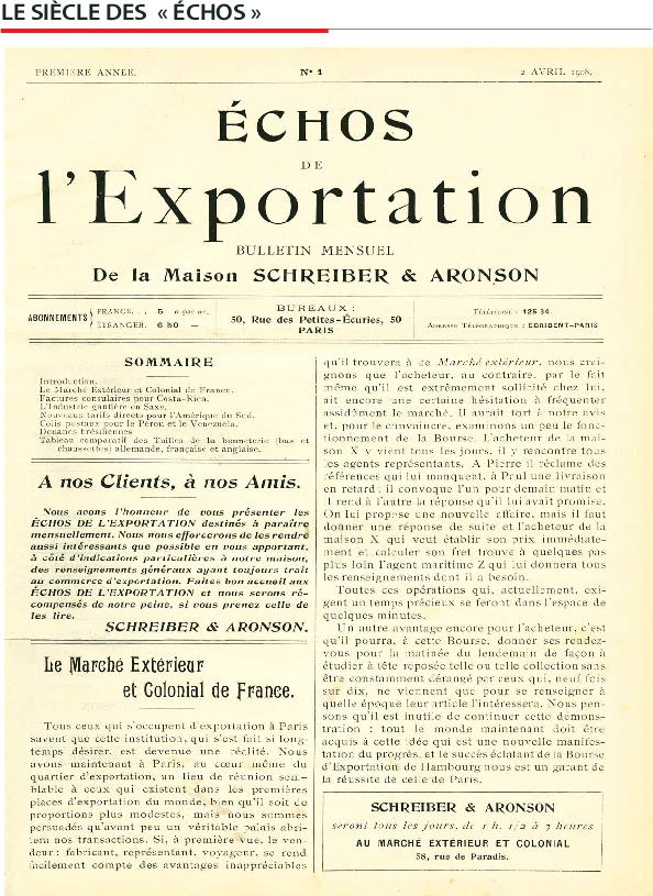 Premier numéro, paru le 2 avril 1908, des Échos de l'Exportation, bulletin mensuel à l'origine du quotidien Les Échos